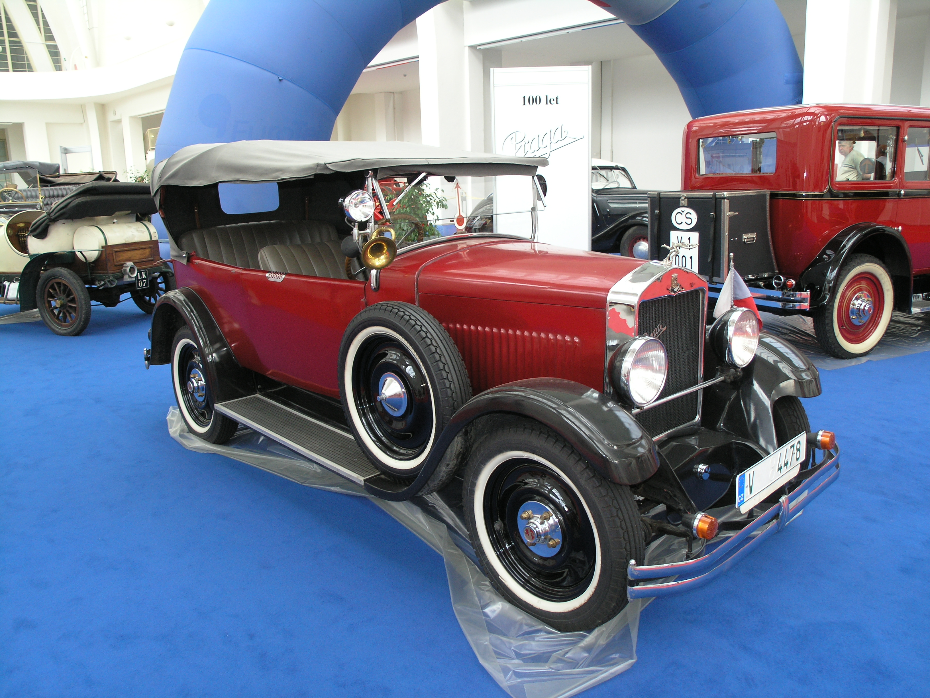 Vůz Praga Piccolo (1931) na výstavě Dědeček automobil v rámci Autosalónu v Brně, v roce 2007